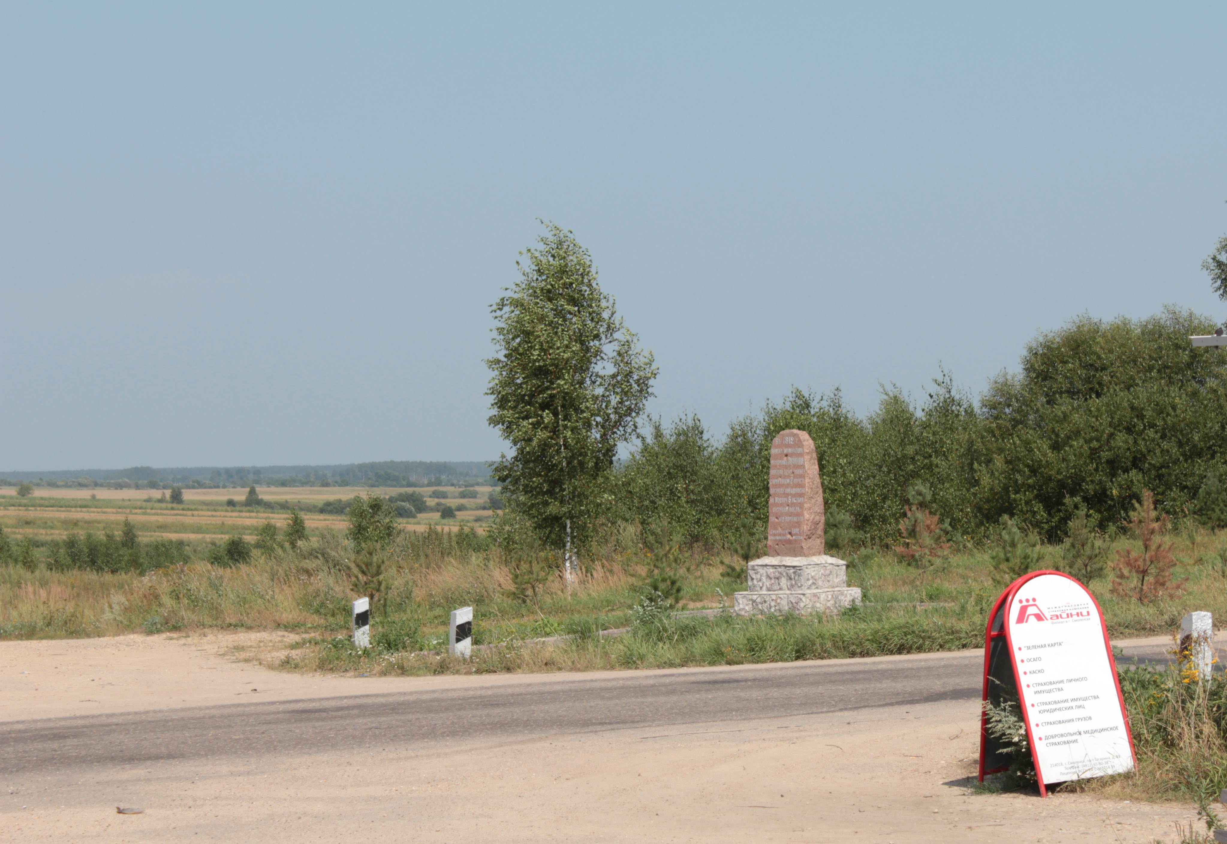 В 1812 года войска императора Наполеона перешли границу старой Руси 2 августа наступая победоносно на Москву. 6 ноября после поражения. Сооружен в 1918 г.